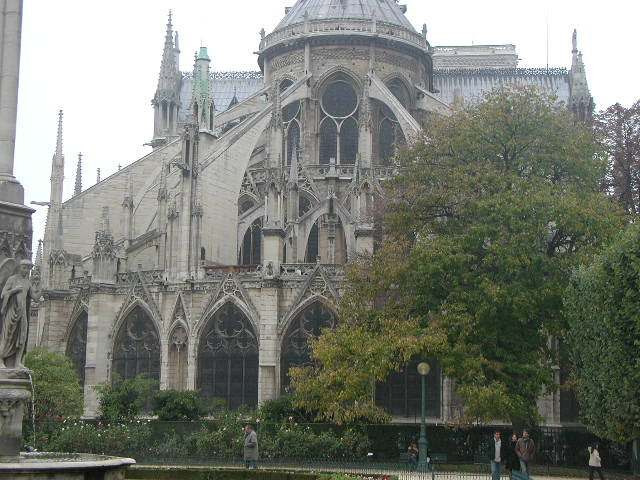 ND Paris : la chevet et les grands arcs-boutants